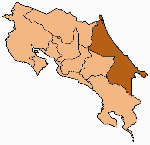 Mappa della diocesi di Limon, in Costa Rica. Lavoro personale, eseguito a partire da questa immagine di Commons. Fonte per i confini delle diocesi